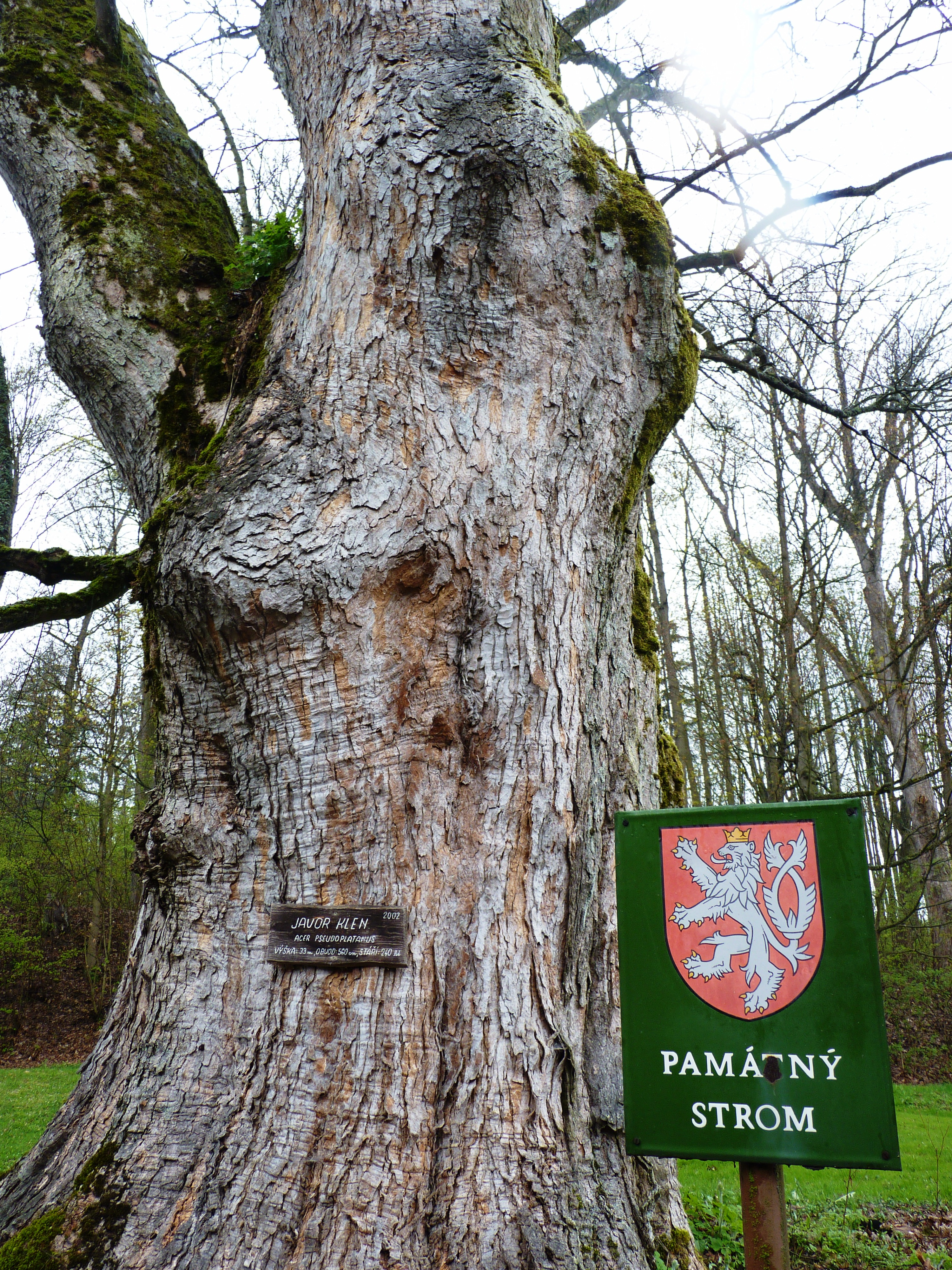 Kněžický klen na jaře 2017.